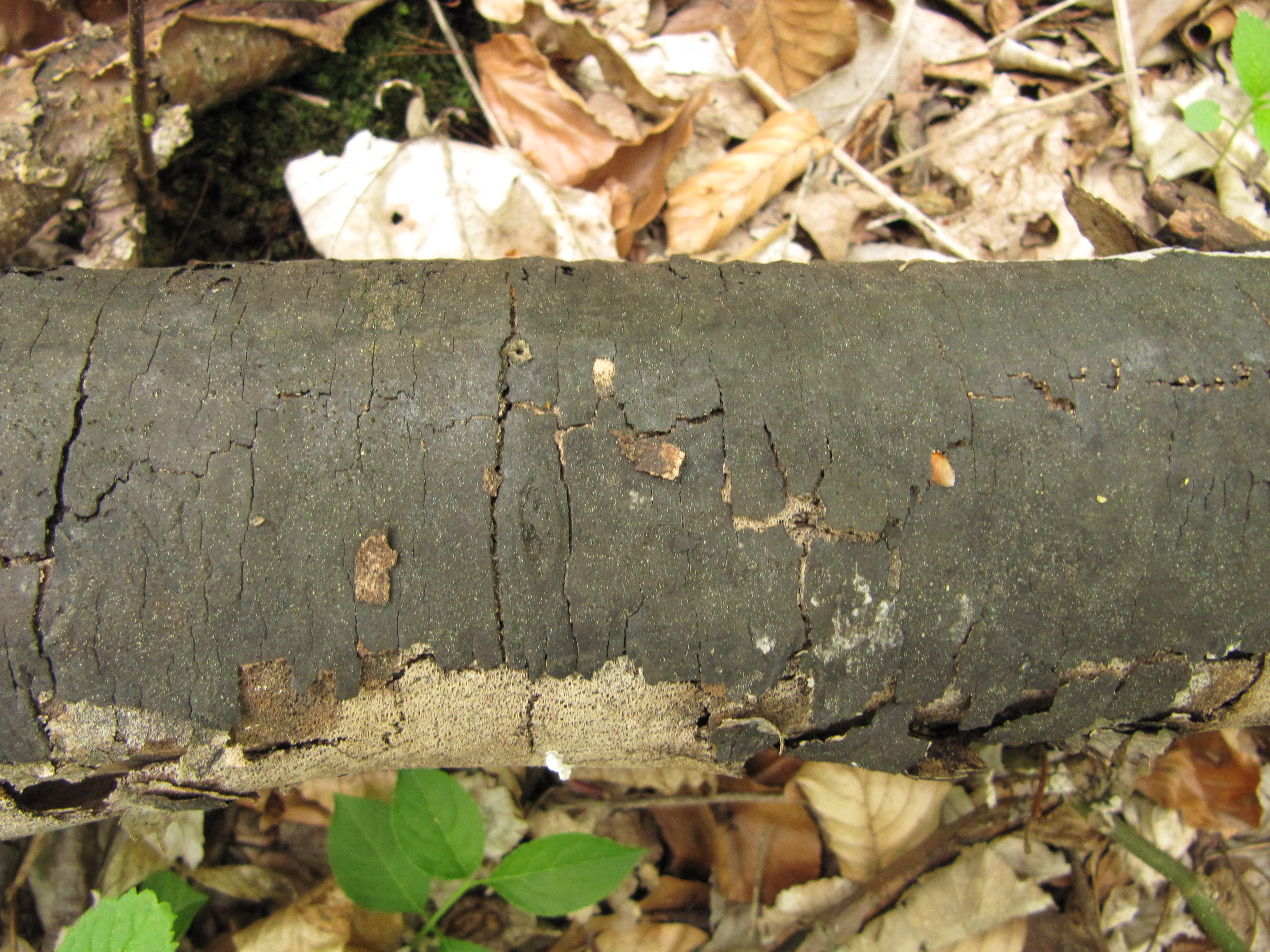 Flächiges Eckenscheibchen (Diatrype stigma)